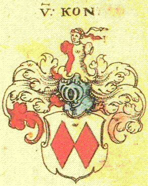 Wappen der Adelsfamilie Könitz